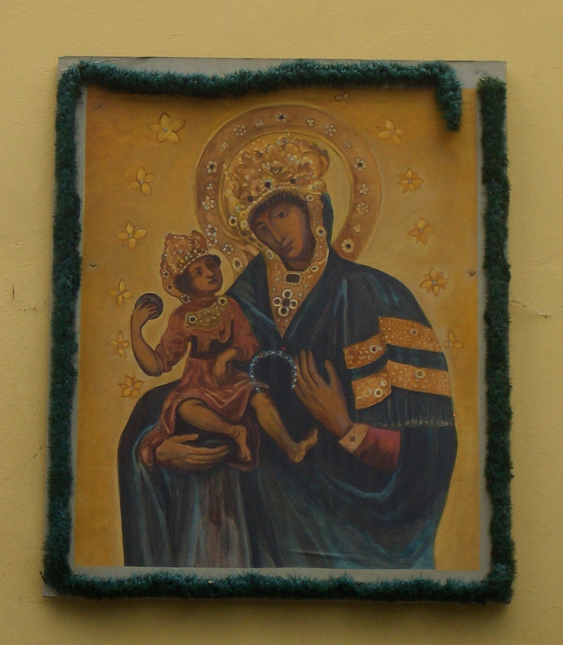 Wllfahrtskirche Heilbruennl Roding: Kopie des Gnadenbildes an der Nordfassade der Kirche